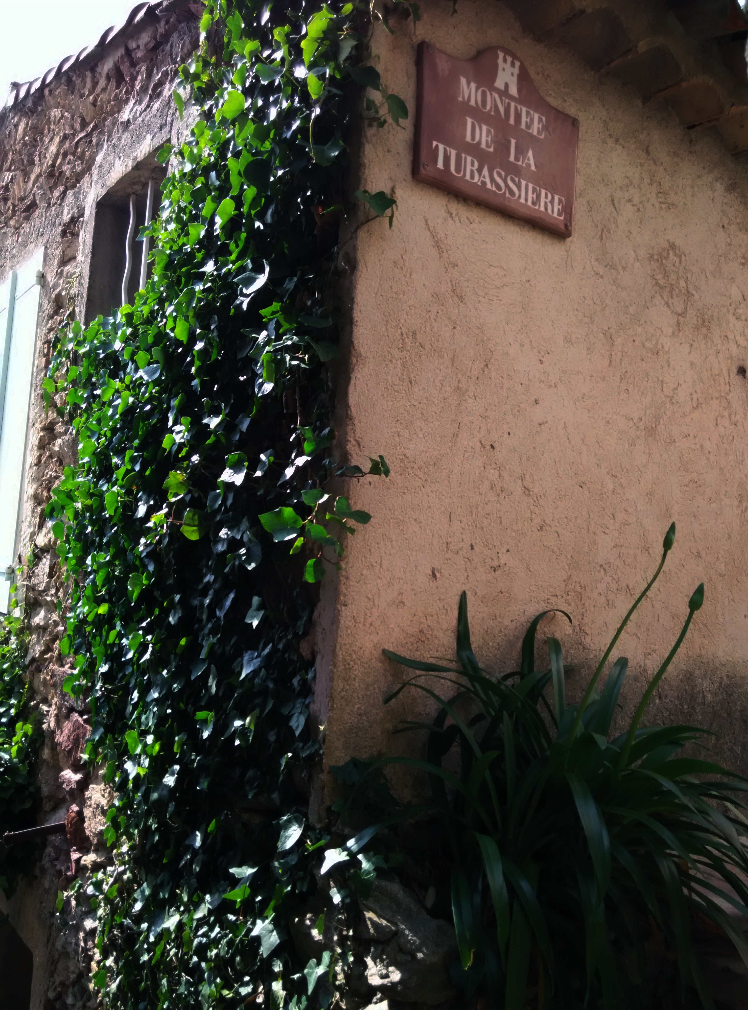 Plaque de rue de montée de la Tubassière à Gassin à l'angle d'une maison dont l'autre pan est couvert de lierre.